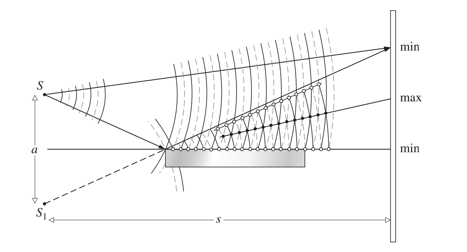 Lloyd'i peegel